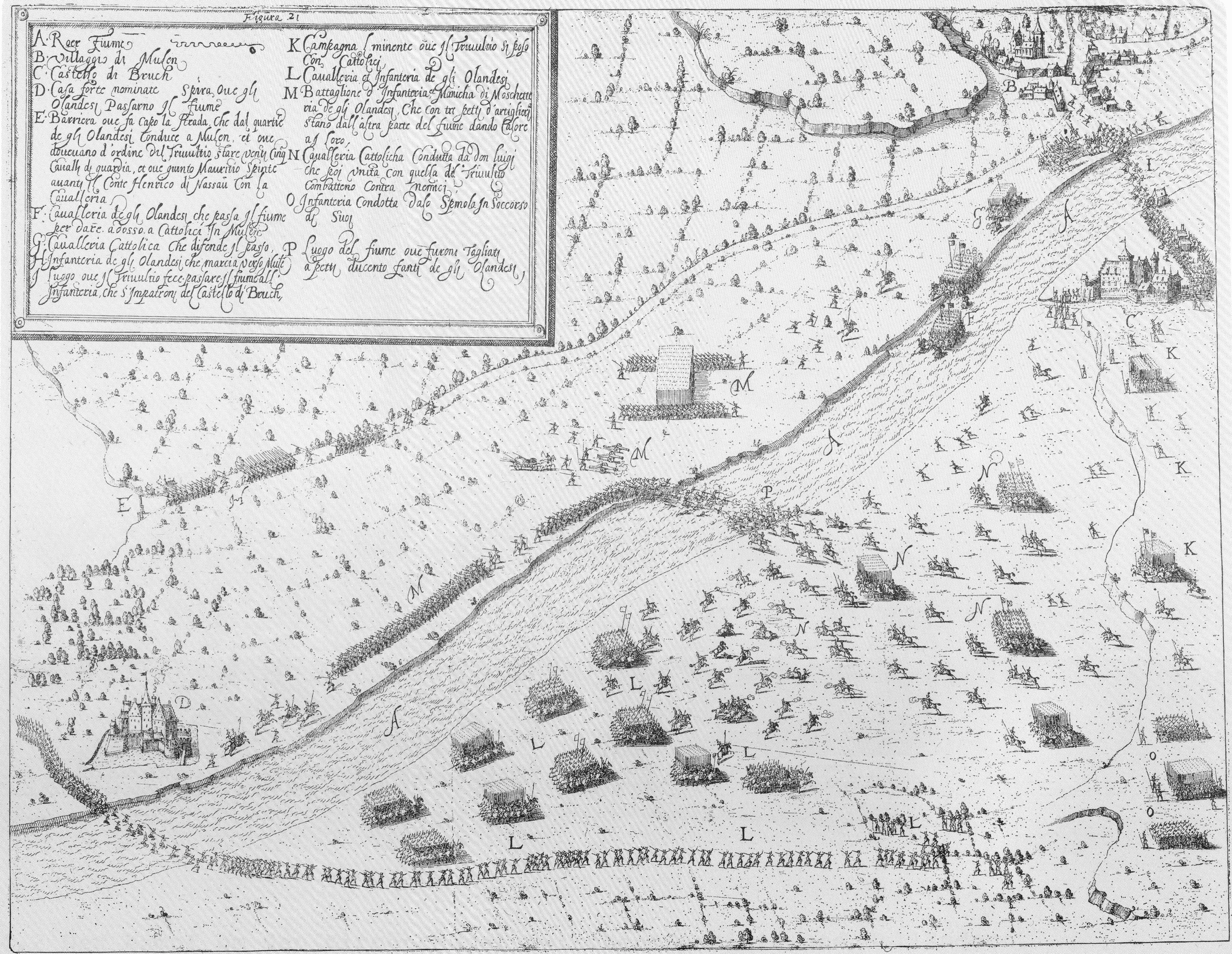 Die Schlacht von Mülheim in Jahr 1605